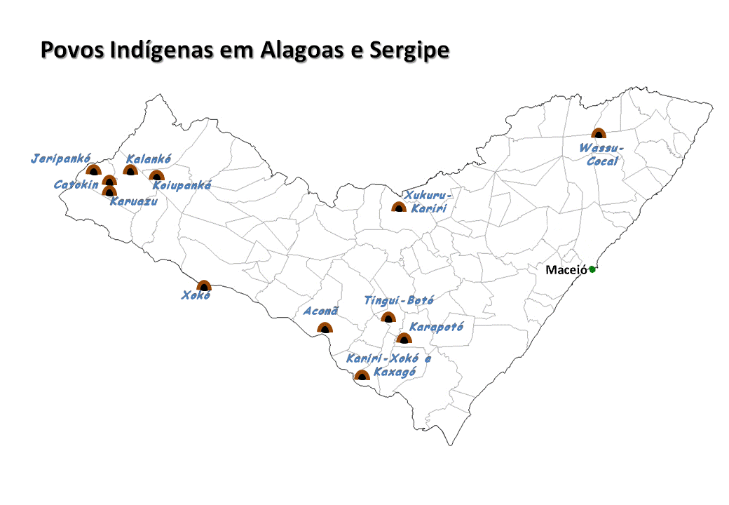 Mapa localizando os povos indígenas em Alagoas e Sergipe